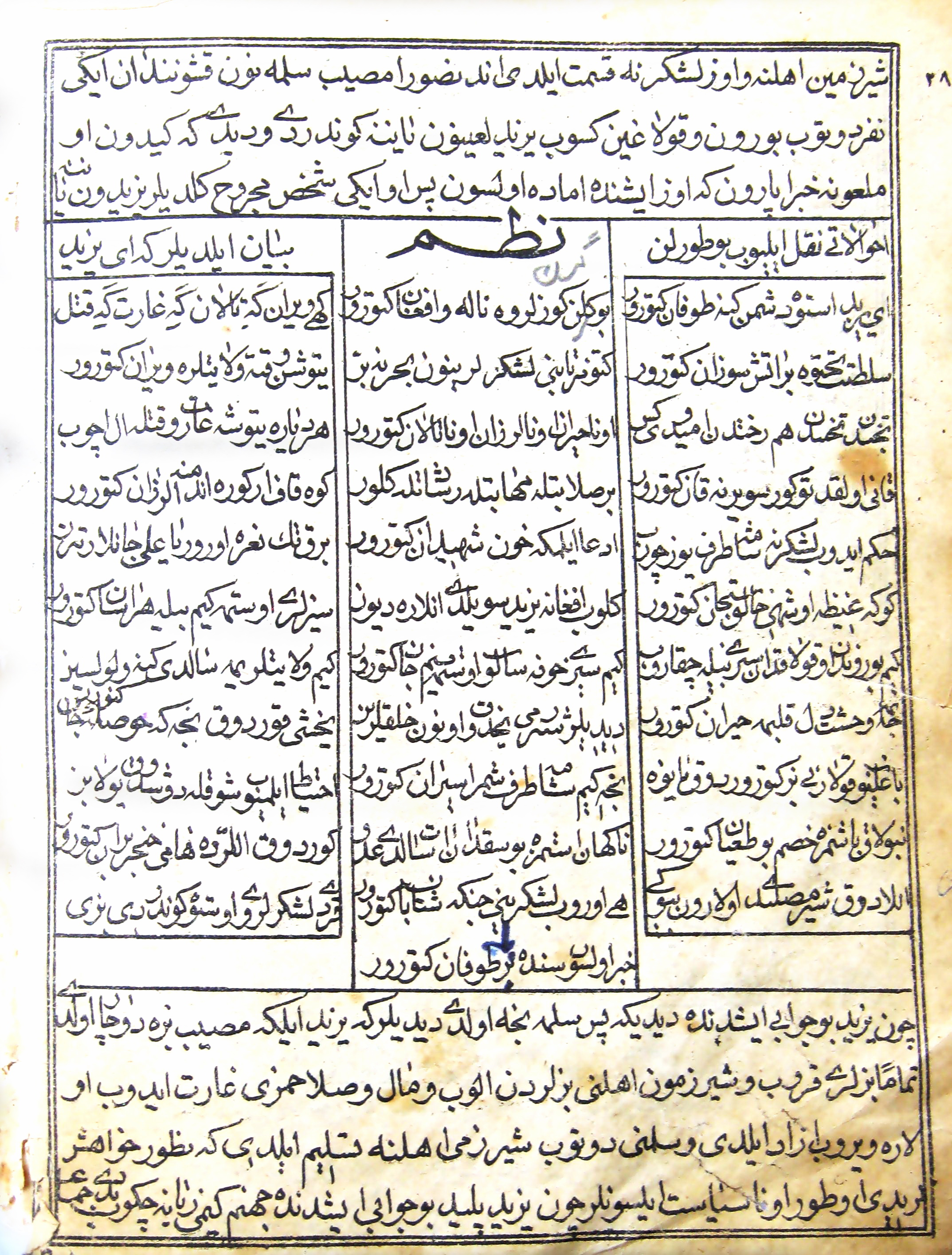 متنی به زبان آذری از مسیّب‌نامه (مجالس‌الهُدا). ادبیات گذشته بهار